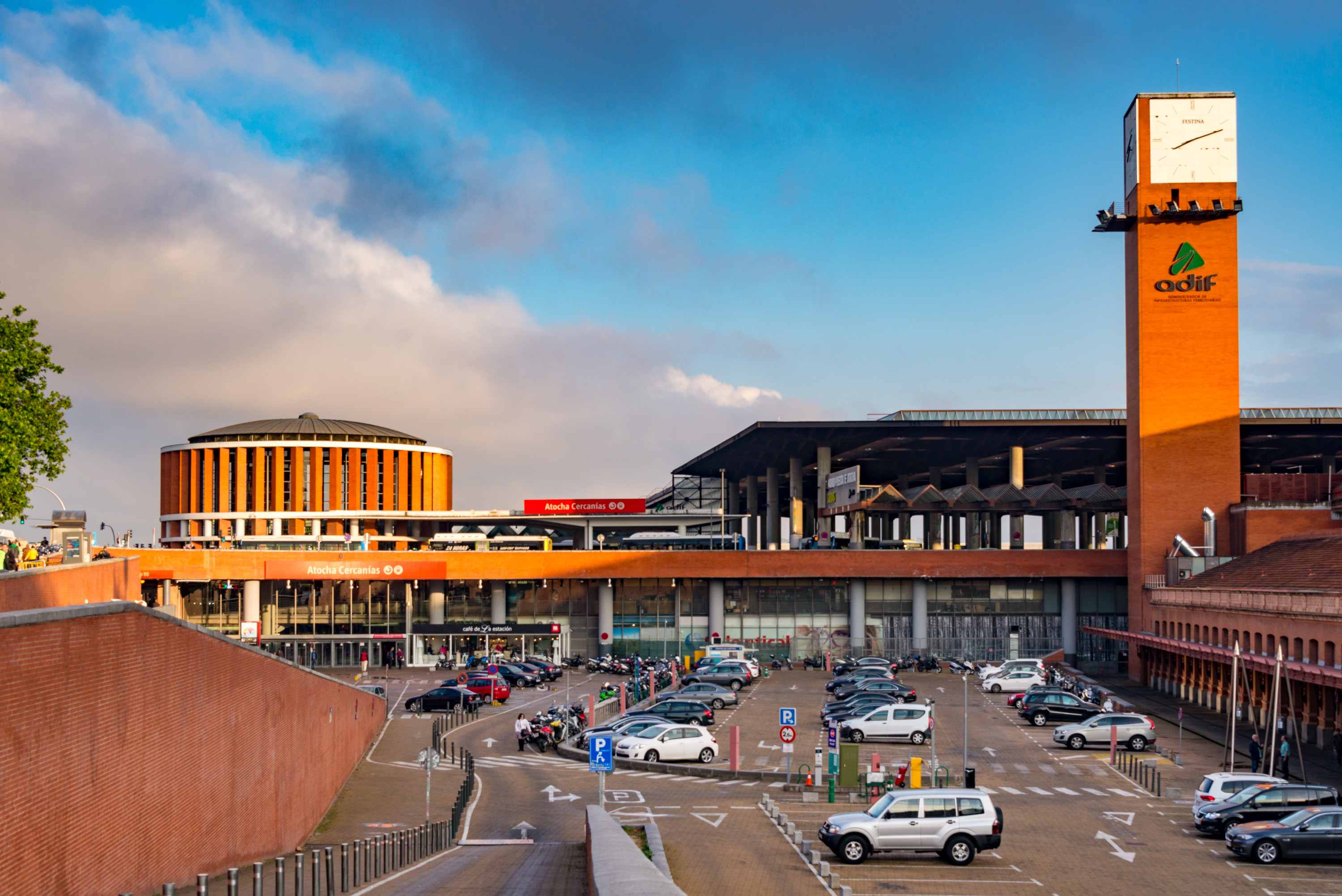 31468-Madrid